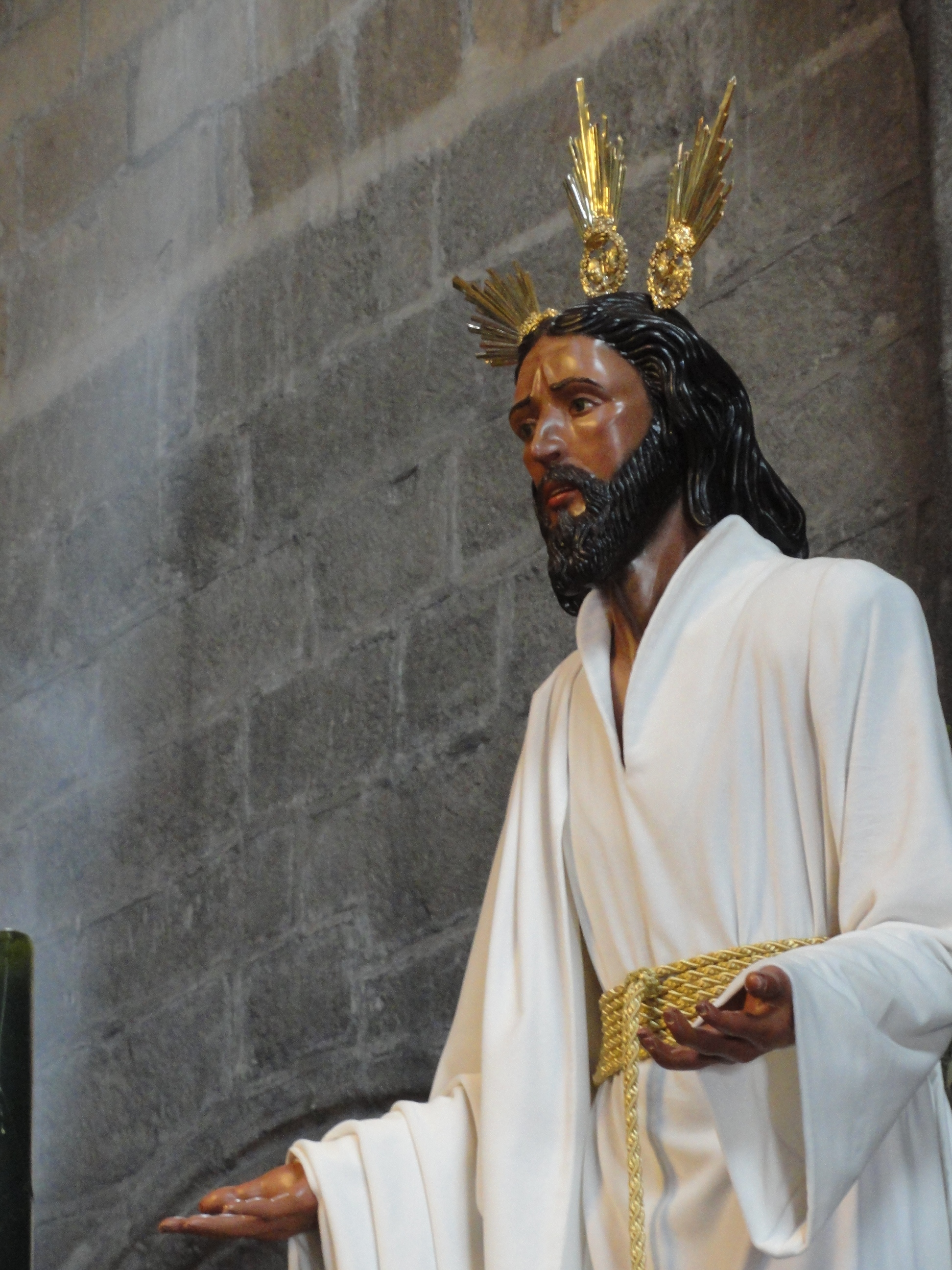 Ntro. Padre Jesús de la Salud en su Prendimiento. Hermandad de Ntra. Sra. de la Esperanza (Ávila).